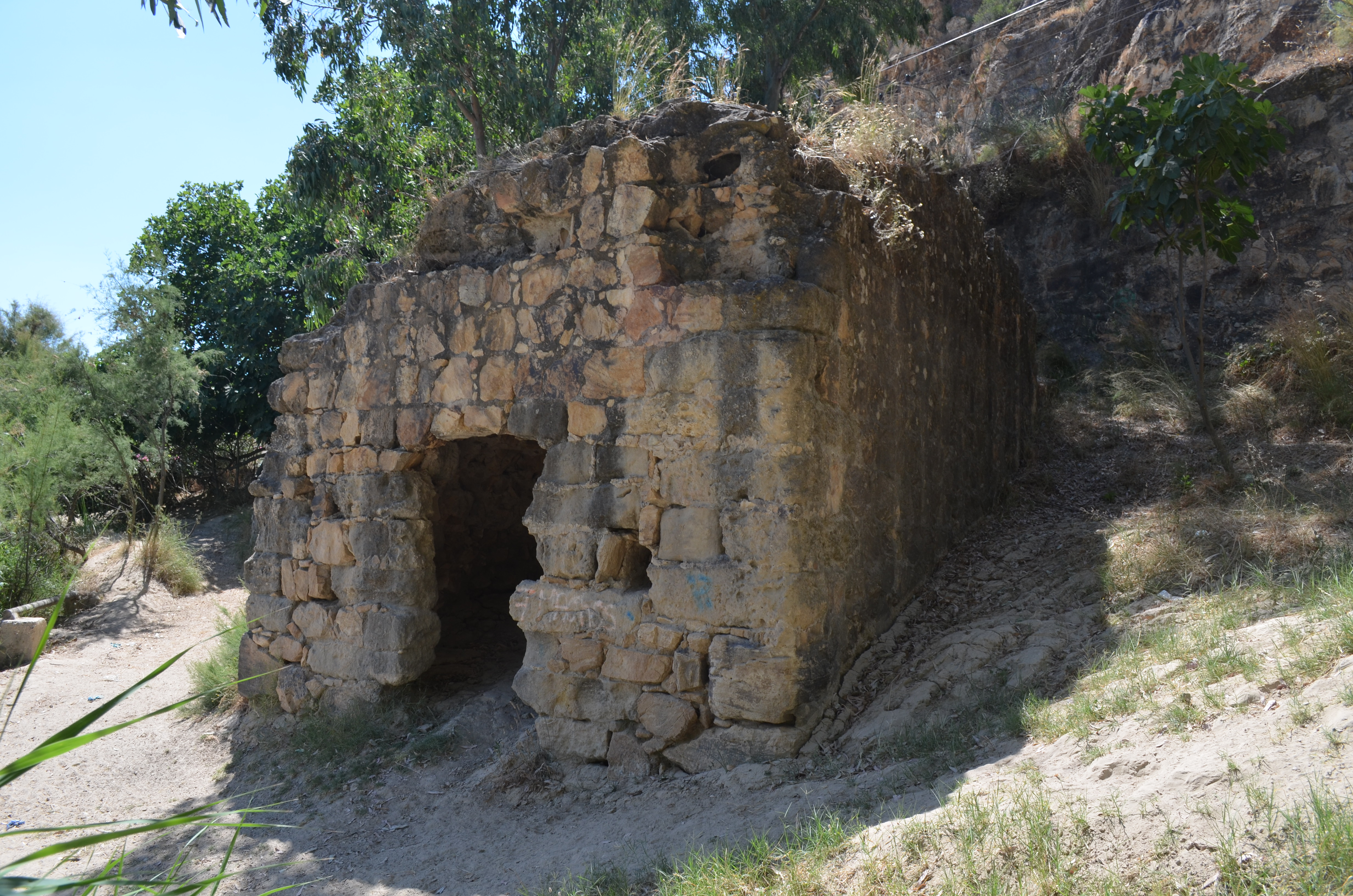 Almacén de mercancías, resto del puerto romano de Almodóvar del Río (Córdoba), al borde del río Guadalquivir